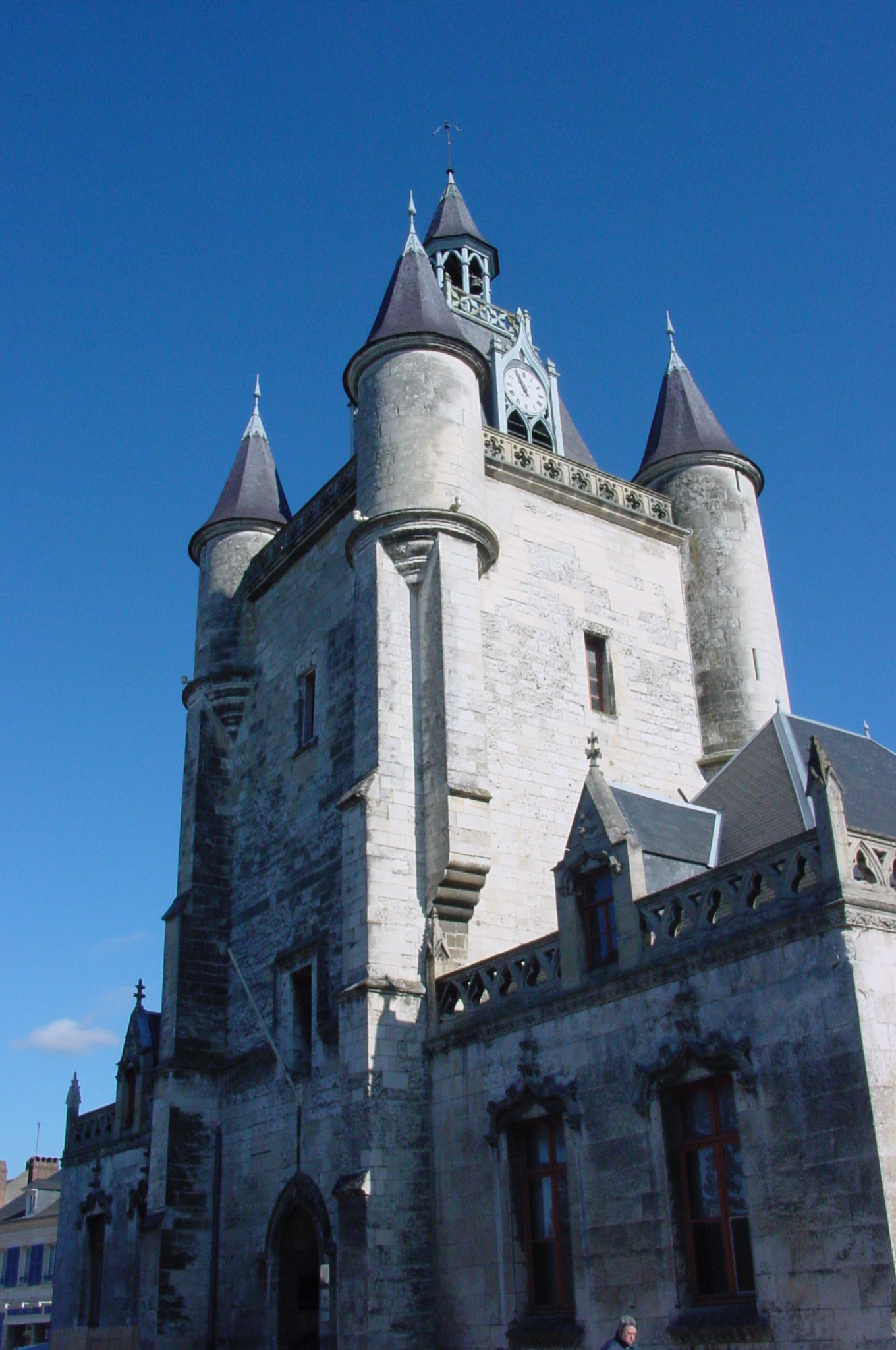 Beffroi de Rue (Somme, France)